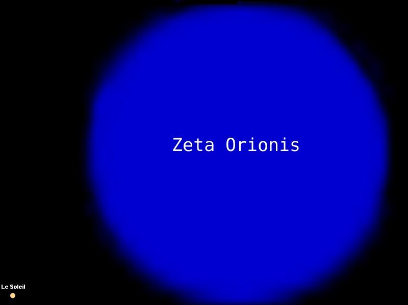 Comparaison de Zeta Orionis avec le Soleil. Auteur : Rogilbert ∞ 22 novembre 2006 à 18:03 (CET)